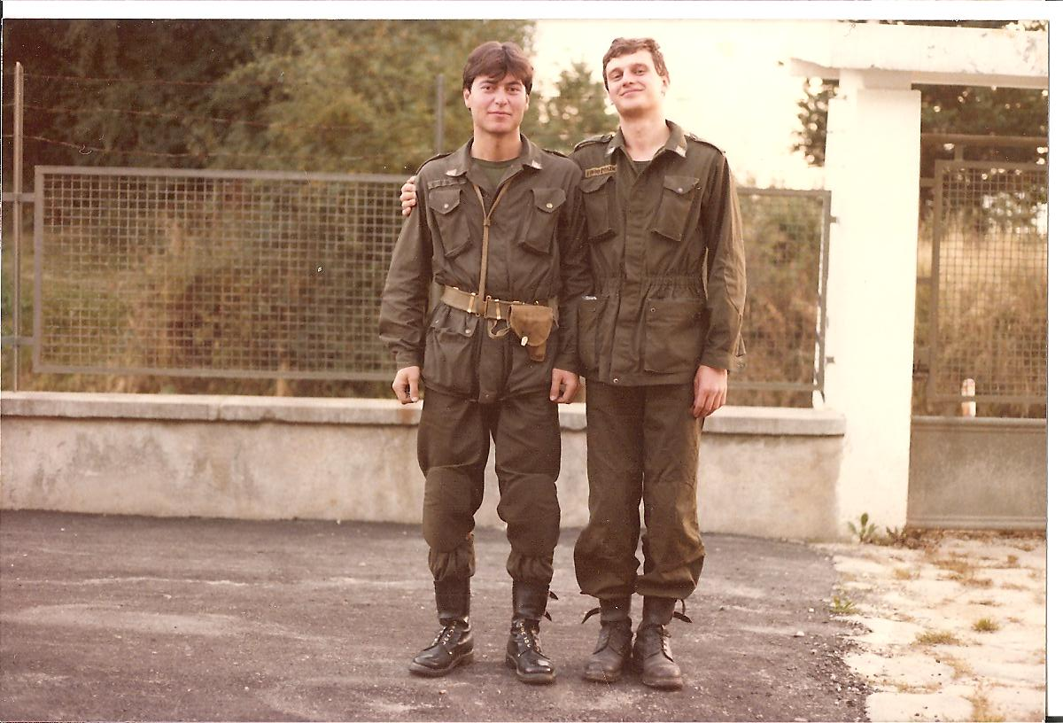 Un momento di svago al corpo di Guardia Principale del sito Rigel